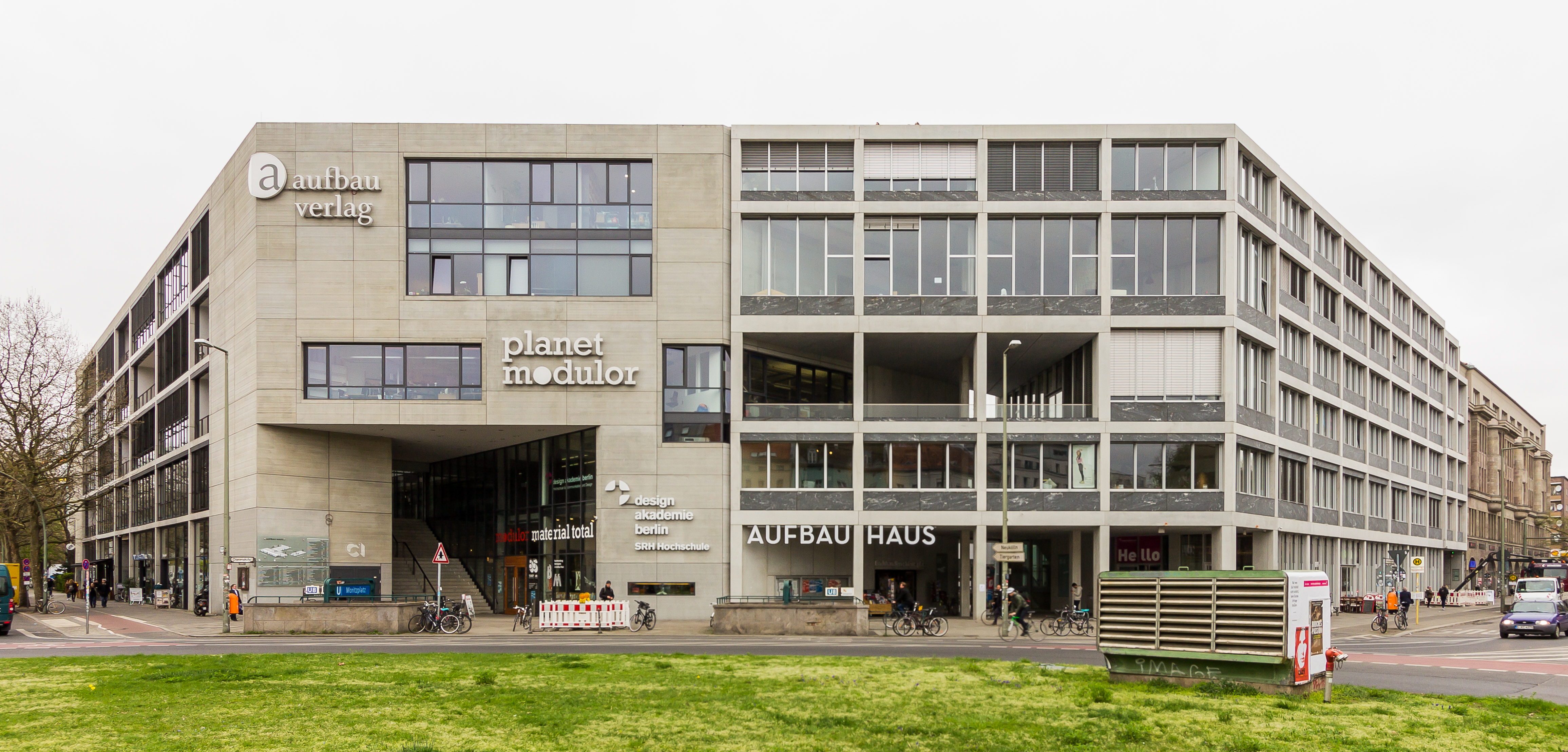 Aufbau Haus, Berlin. Nach Fertigstellung des 1. und 2. Bauschnittes